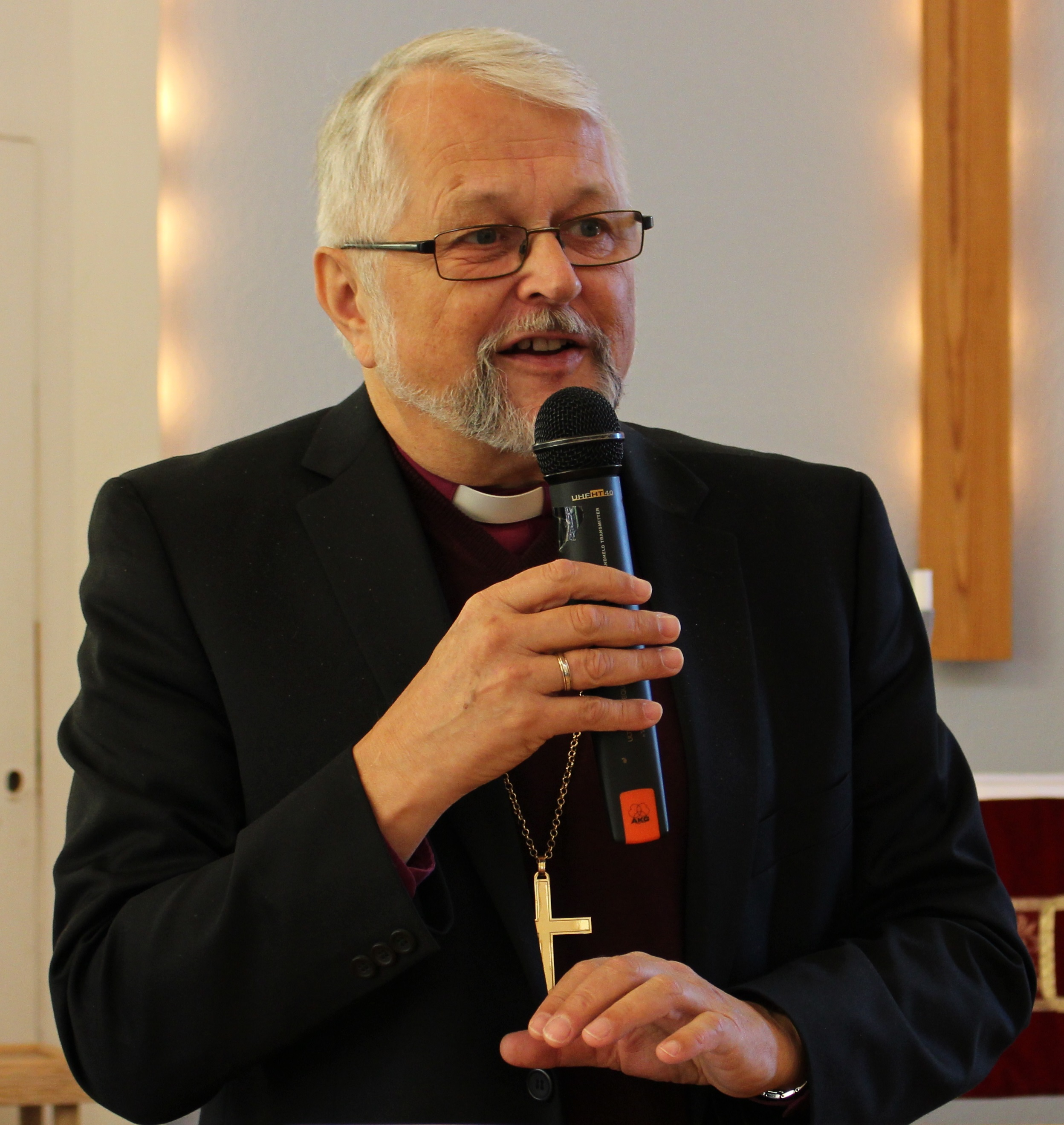 Biskop Thor Henrik With.